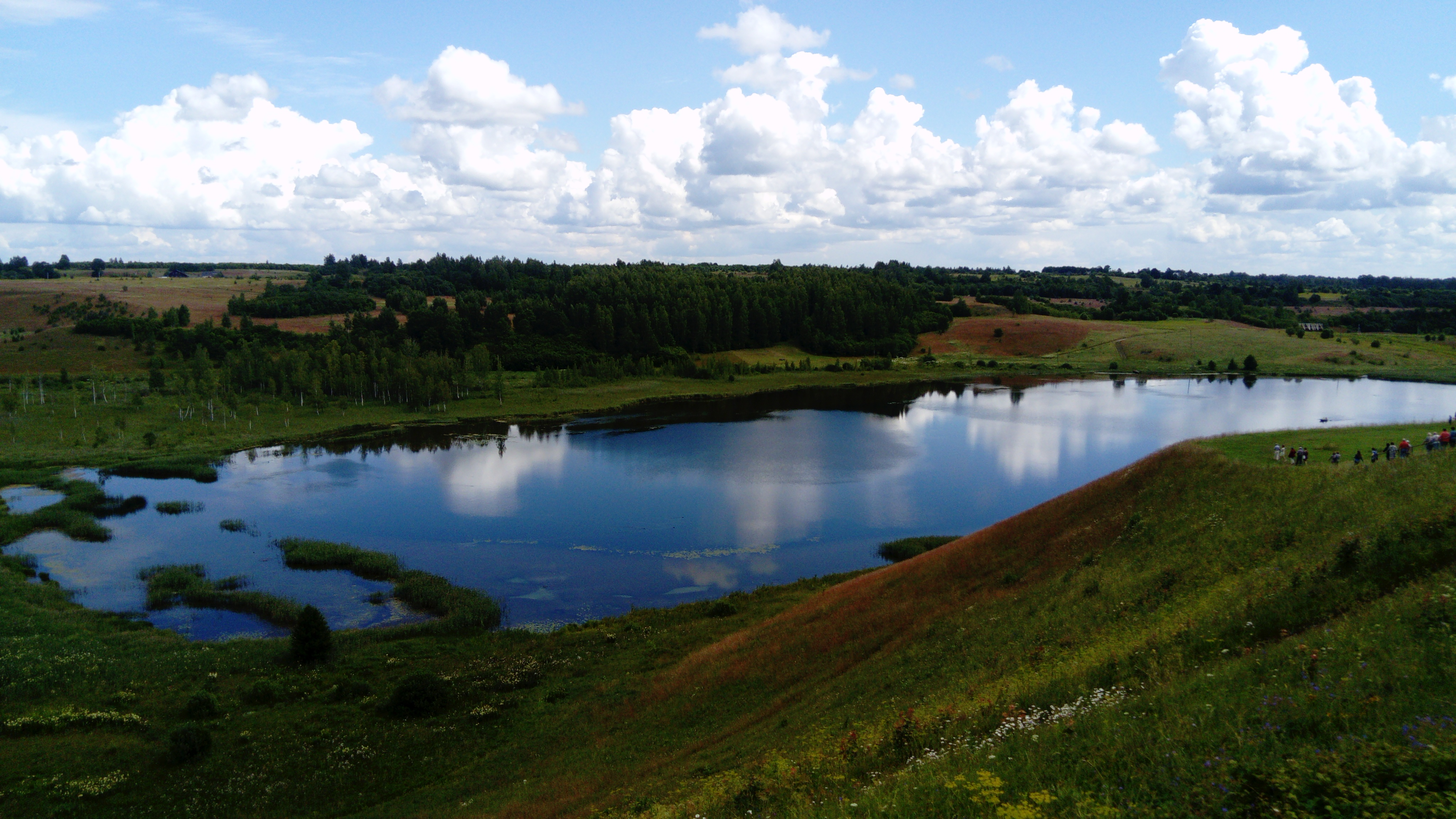 Городищенское озеро (2017) — Изборск, Псковская область